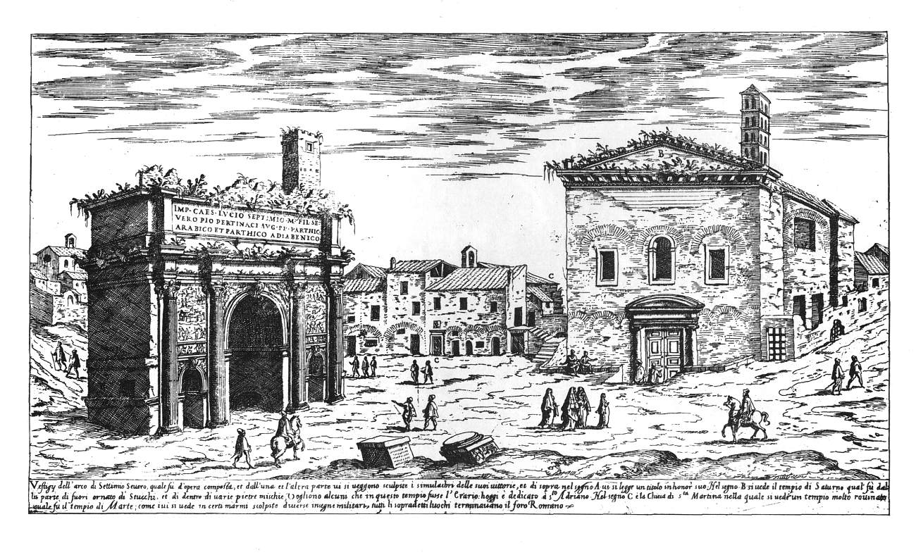 Comitium